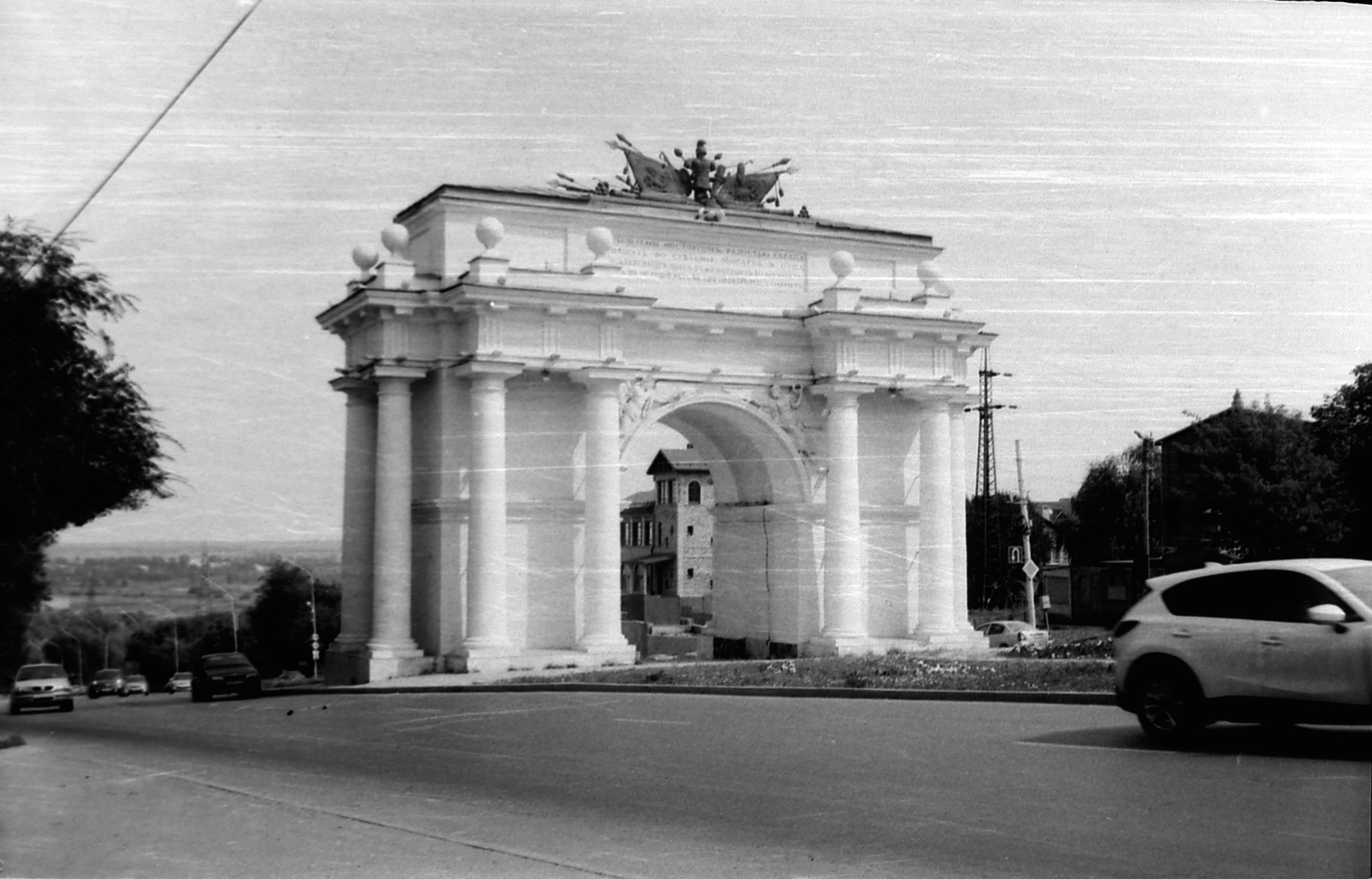 Арка триумфальная (северная): спуск им.Герцена, Новочеркасск, Ростовская область